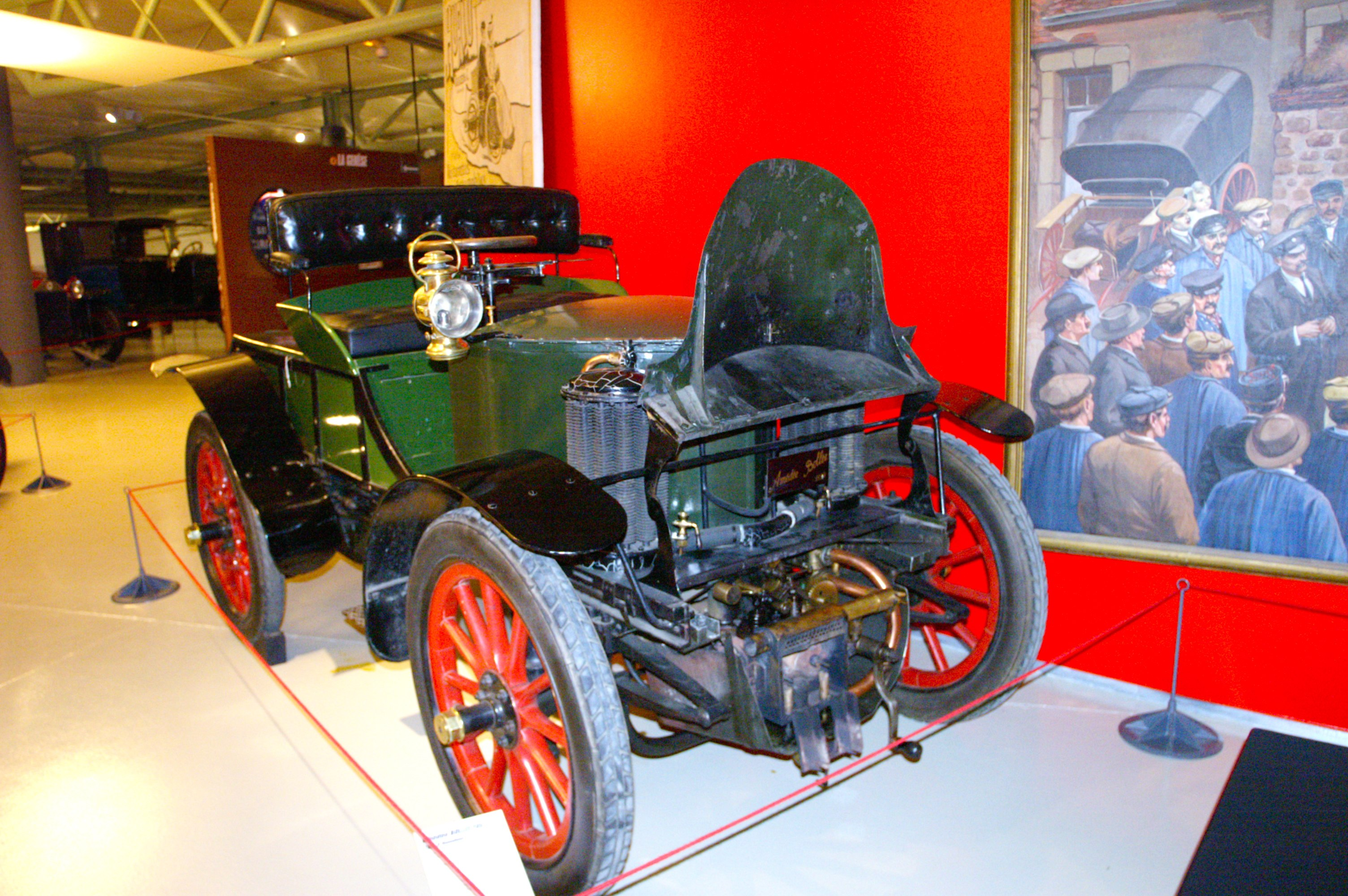 1899-1901 Amédée Bollée Fils 9 CV Type D at Le Musee des 24 Heures